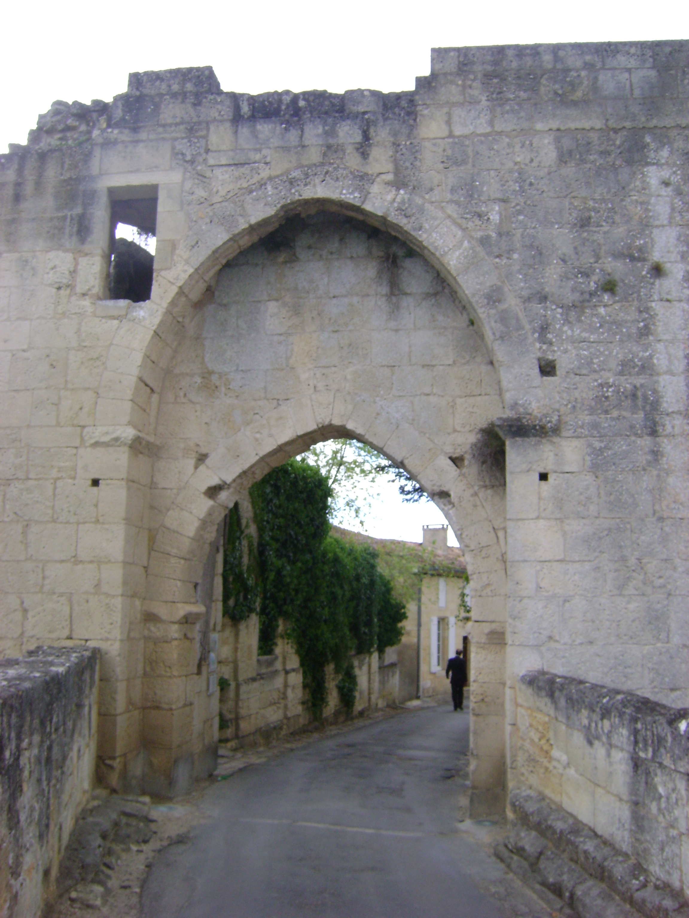 Remparts de Saint-Emilion, Gironde. La Porte Brunet. .